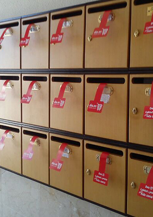 ejemplo de campaña de perching